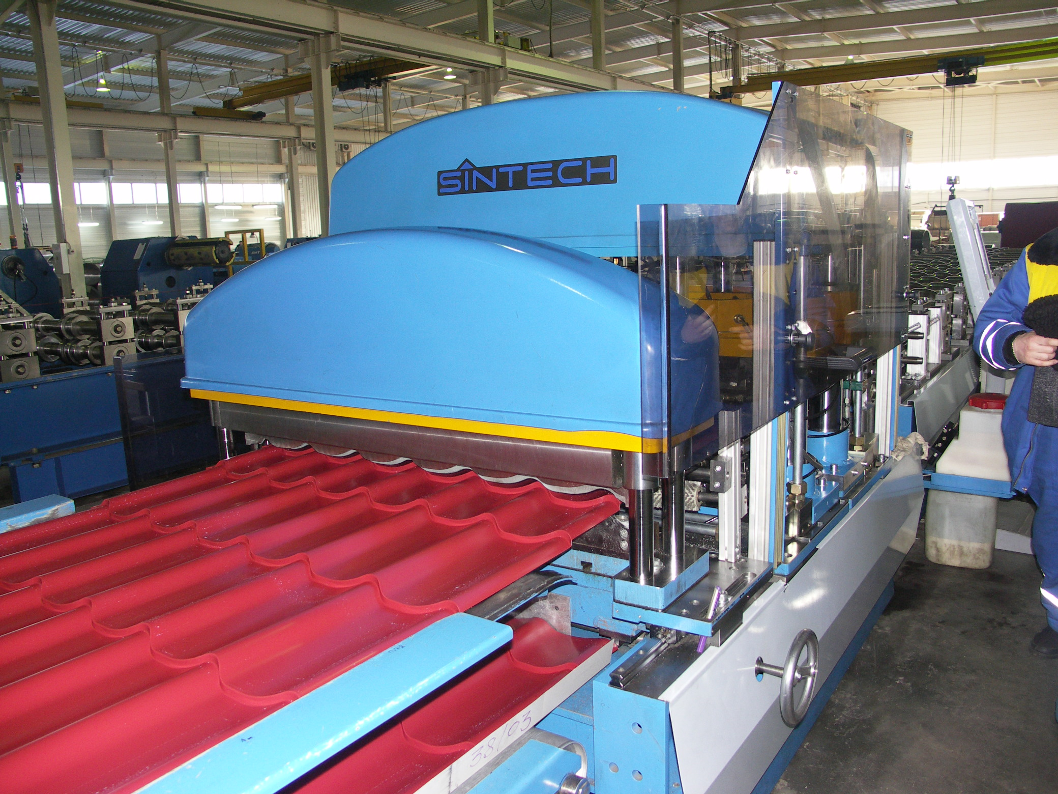 Металлочерепица коричневого цвета